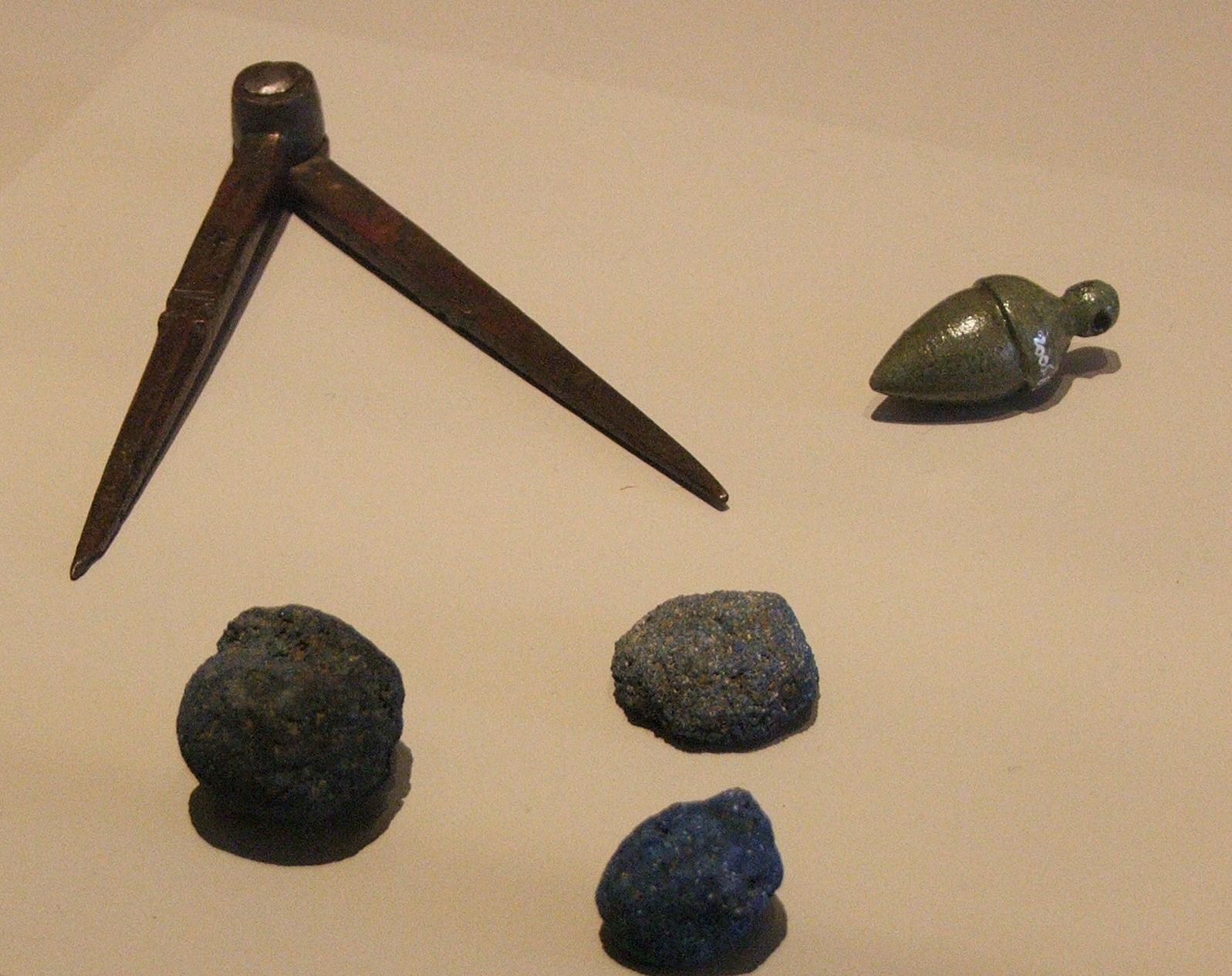 Compas et instruments divers retrouvés dans les sites antiques du Mans, ou Vindu(i)num, notamment sur le site des Halles.